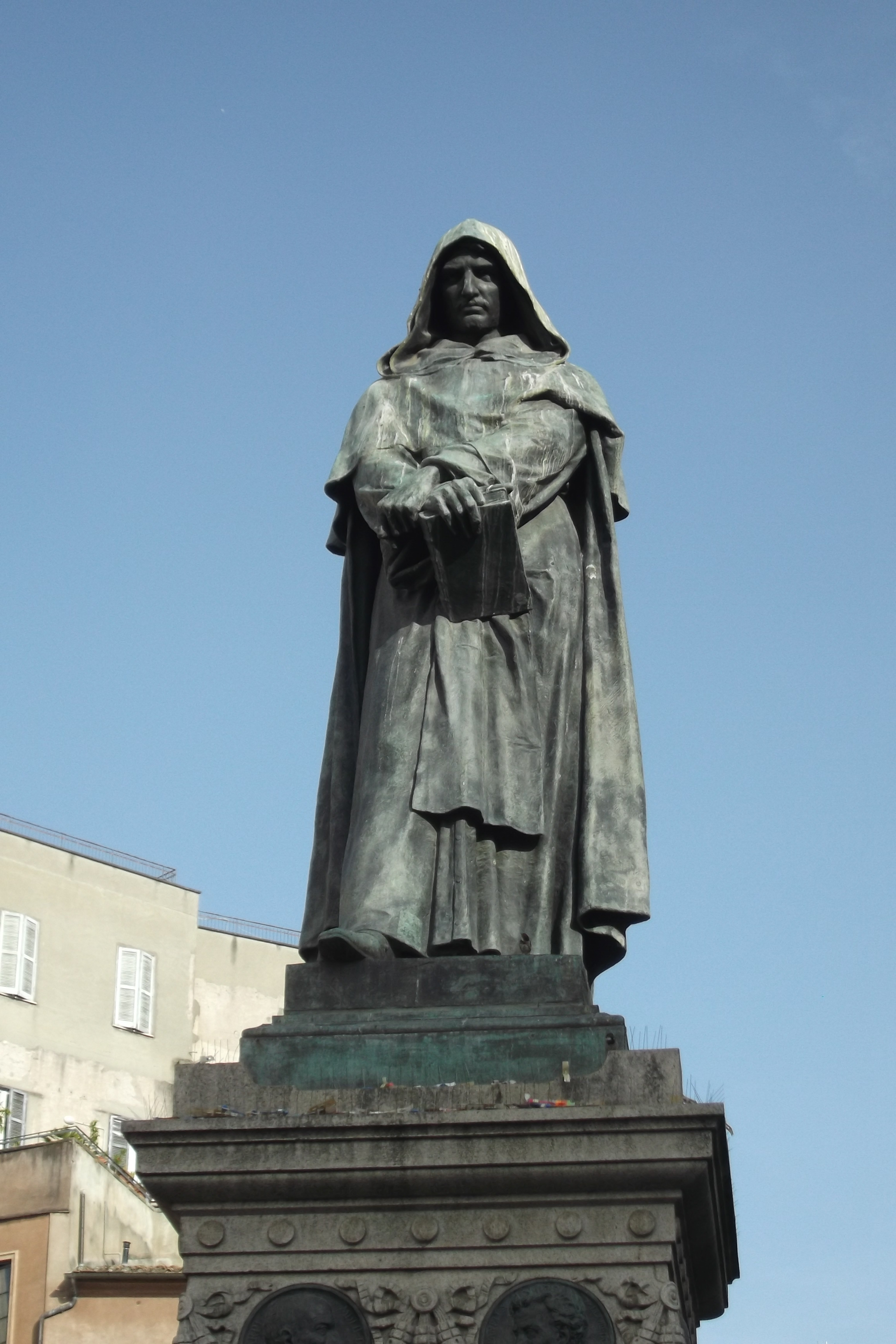 Monument to Giordano Bruno in Campo de' Fiori (Rome)